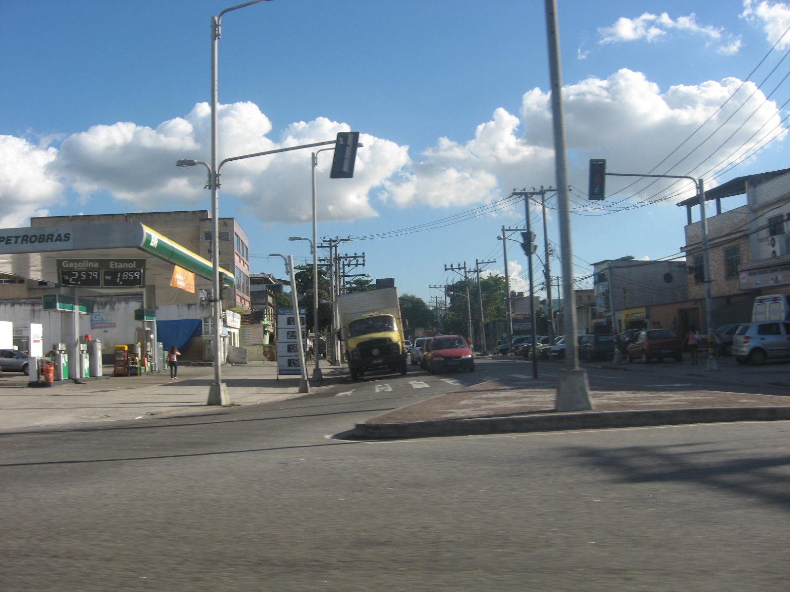 Vista do bairro de Irajá, localizado na zona norte da cidade do Rio de Janeiro.